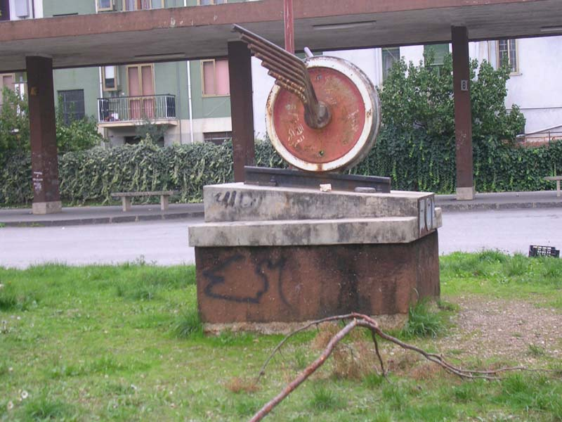 Monumento alle F.C.L. all'autostazione di Castrovillari (CS)